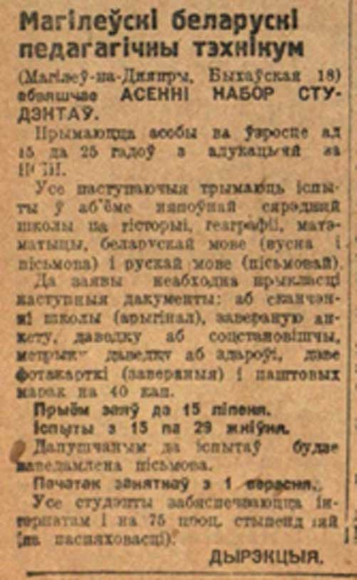 Абвестка пра набор навучэнцаў у Магілёўскі беларускі педагагічны тэхнікум. Газета «Звязда», 1935 г.